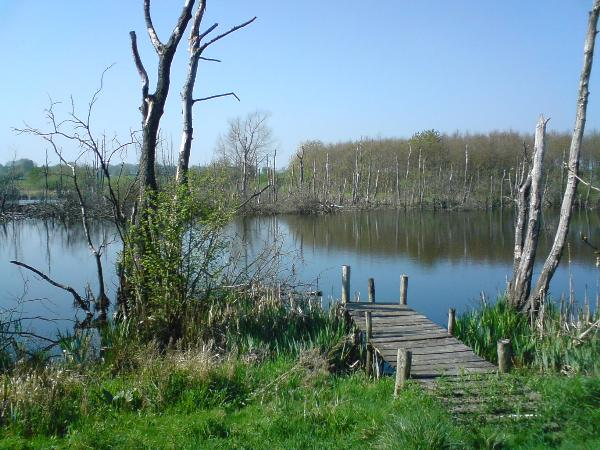 Baronmosen med døde træer langs kanten.